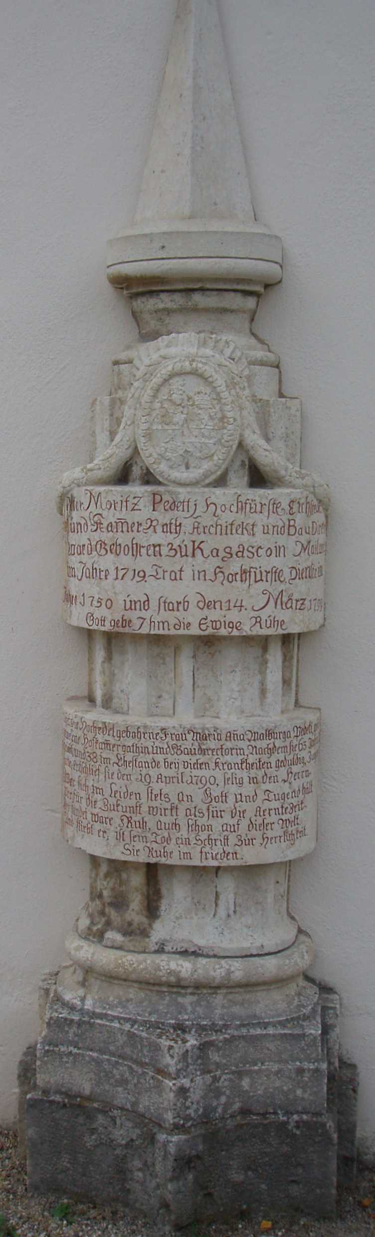 Grabmal des Maurizio Pedetti auf dem Eichstätter Ostefriedhof